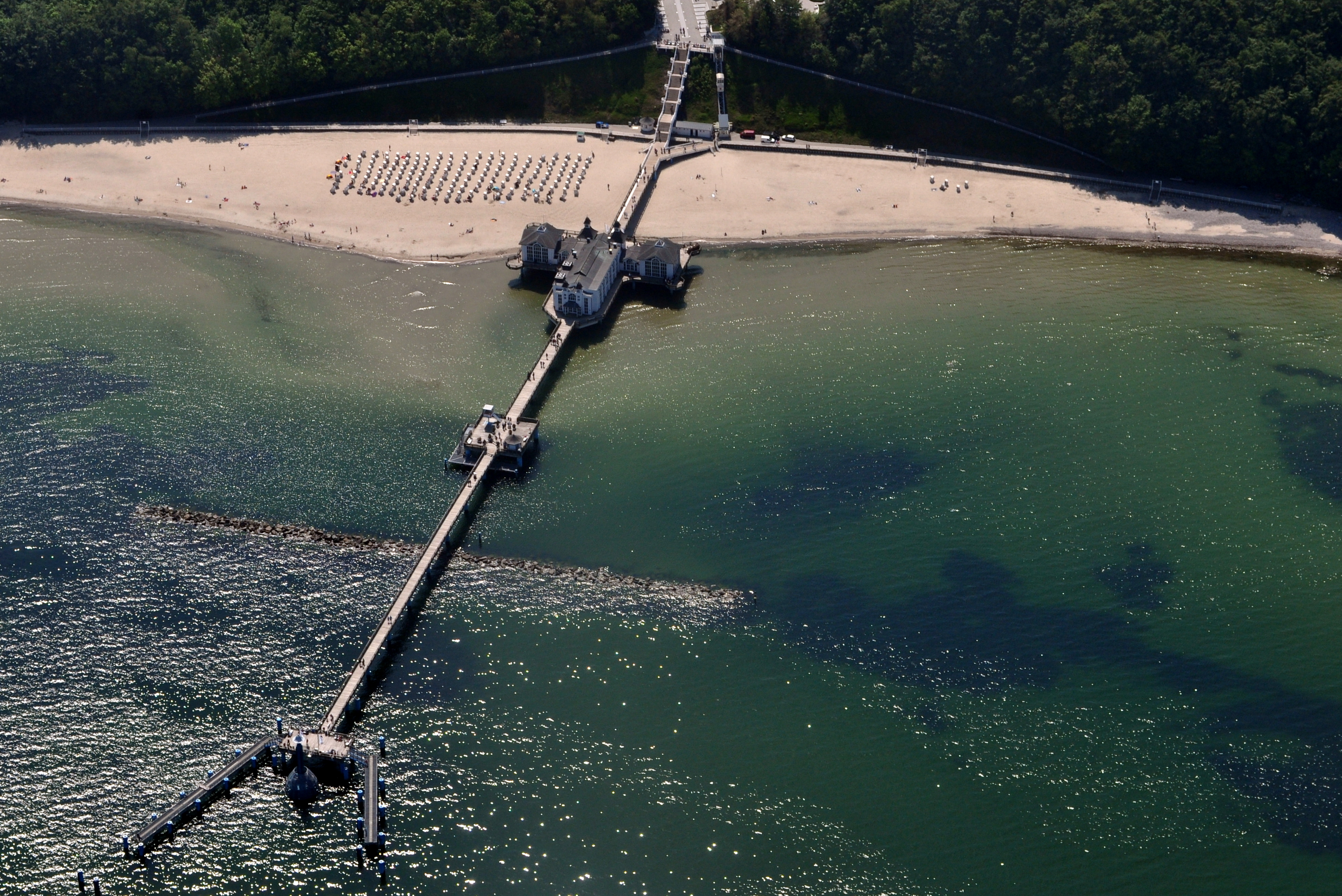 Die Bilder wurden von mir während eines einstündigen Rundflugs ab Flugplatz Güttin am 21. Mai 2011 aufgenommen. Die Bildbeschreibung steht im Dateinamen. Aufgenommen mit einer Nikon D5000 durch das Seitenfenster des Flugzeugs.